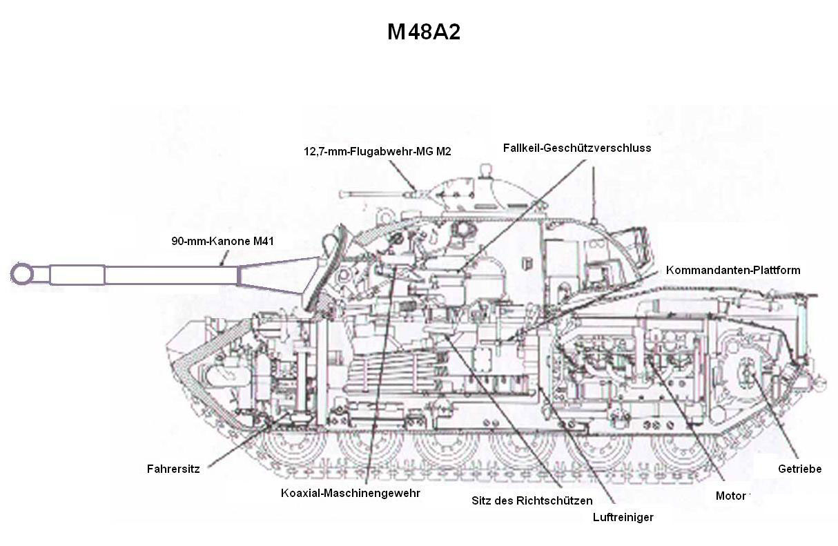 Risszeichnung des Panzers M48A2 Aus der TDv Kampfpanzer M48A2 von 1956 Teil 22